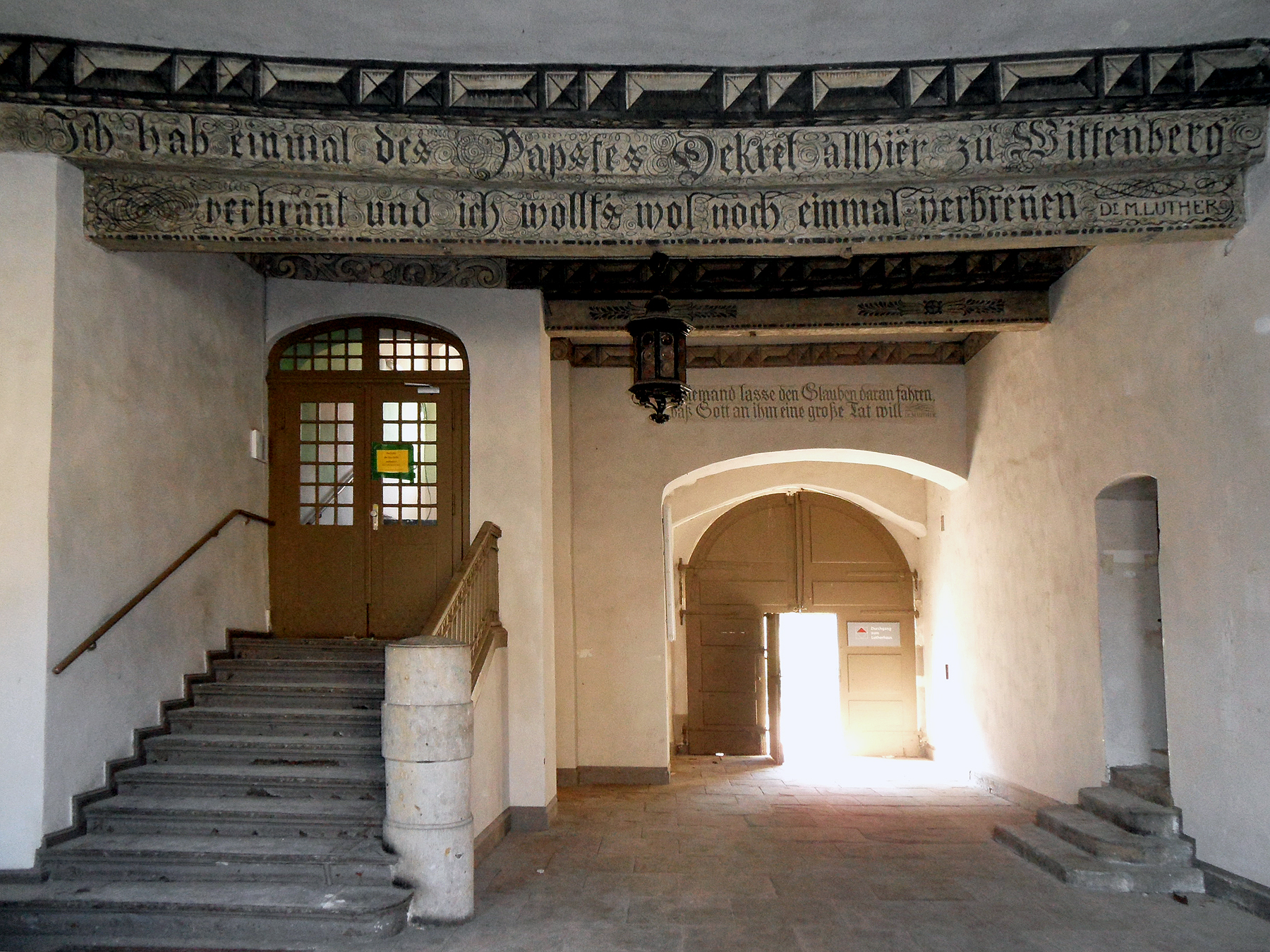 Augusteum, Lutherstadt Wittenberg, Sachsen-Anhalt, März 2014 Eingangshalle mit Durchgang zum Hof.